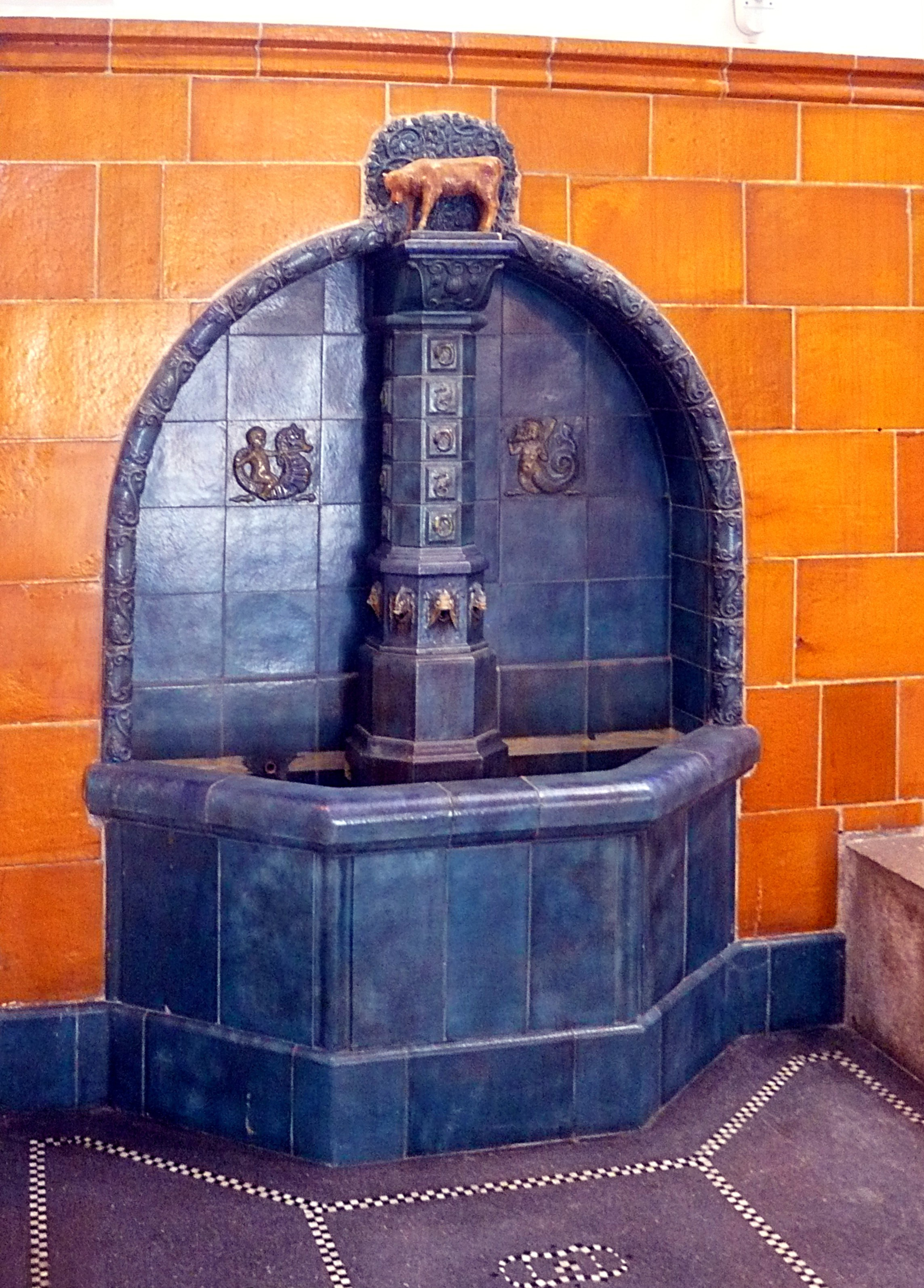 Schneeberg, Rathaus: Wandbrunnen an der Treppe im Foyer